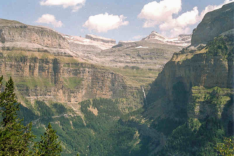 Valle de Ordesa tomado desde la Senda de Cazadores en las inmediaciones del Mirador de Garcilarruego. En primer término, Circo y cascada de Cotatuero. Al fondo, el Taillón a la izquierda, la Brecha de Rolando en el centro y El Casco a la derecha. Fotografía de José María Sánchez para Wikipedia Tomada el 21 de julio de 2003